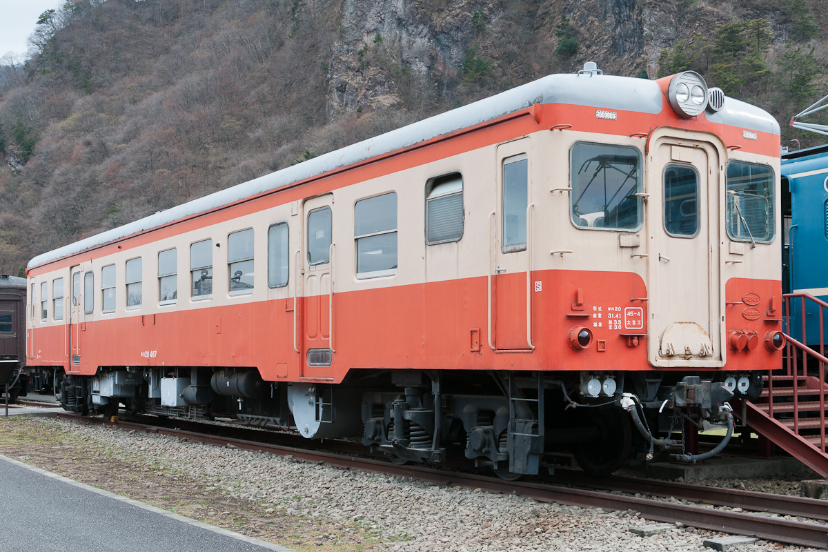 国鉄キハ20形（キハ20 467）気動車。碓氷鉄道文化村の保存車。